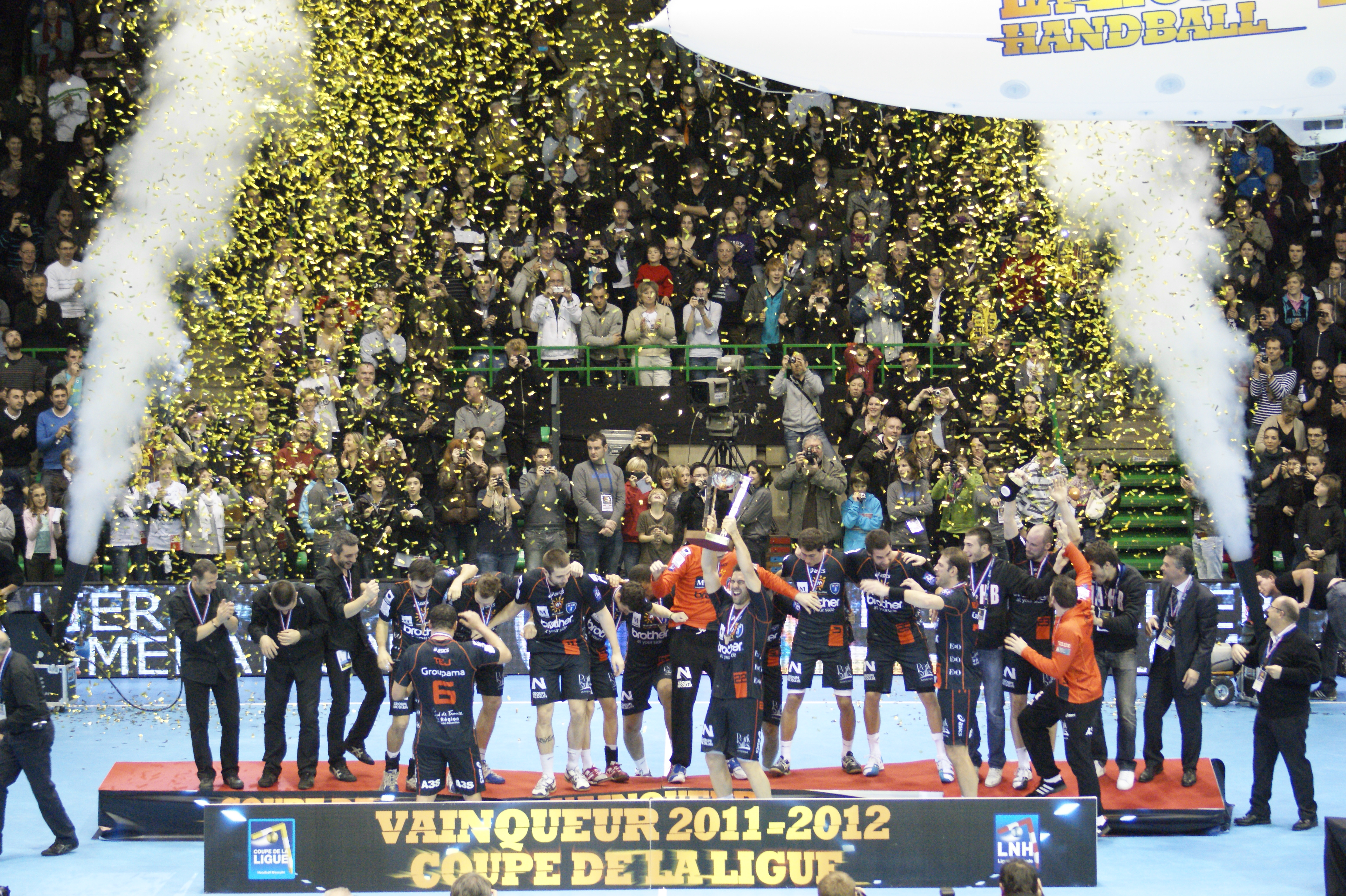 L'équipe de Montpellier Agglo HB remporte pour la 8ème fois la coupe de la ligue de Handball. Ici à Nantes en 2011